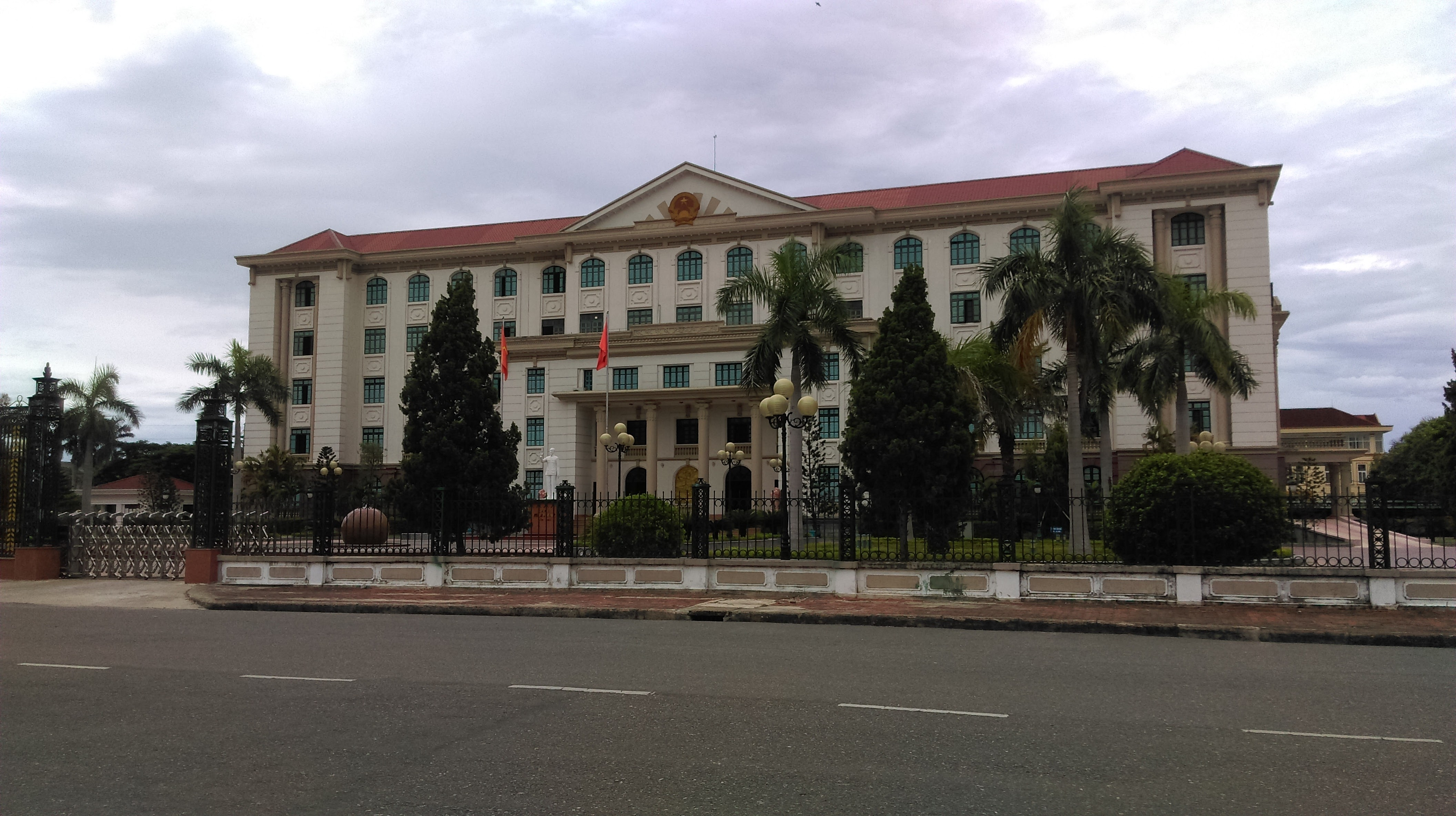 UBND tỉnh Hà Tĩnh